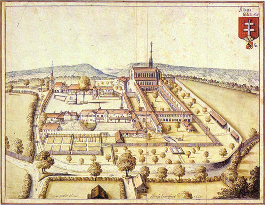 Monastery of Königsfelden in 1669